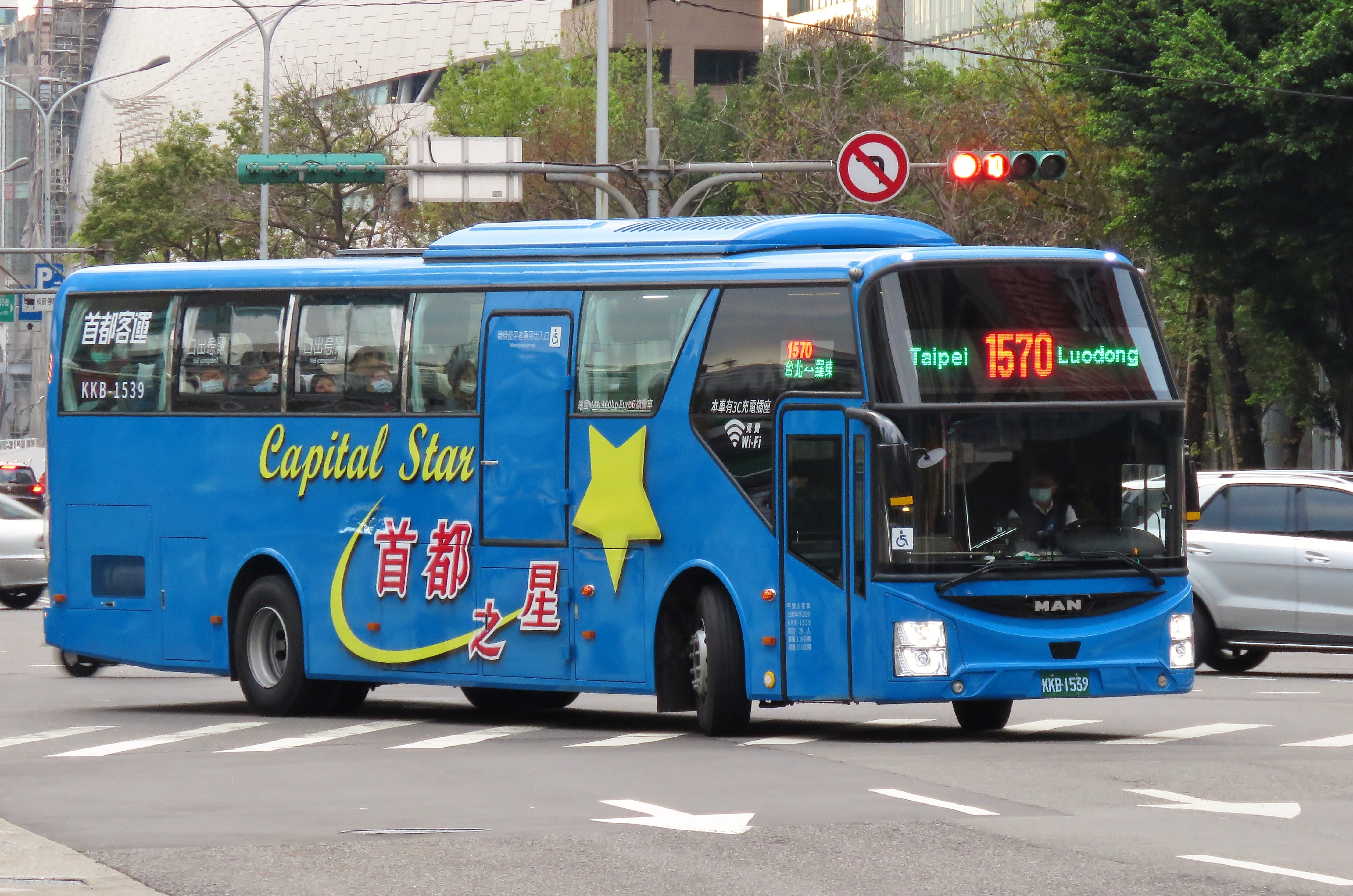 中文（台灣）: 首都客運2020年MAN 19 460 CO大客車KKB-1539